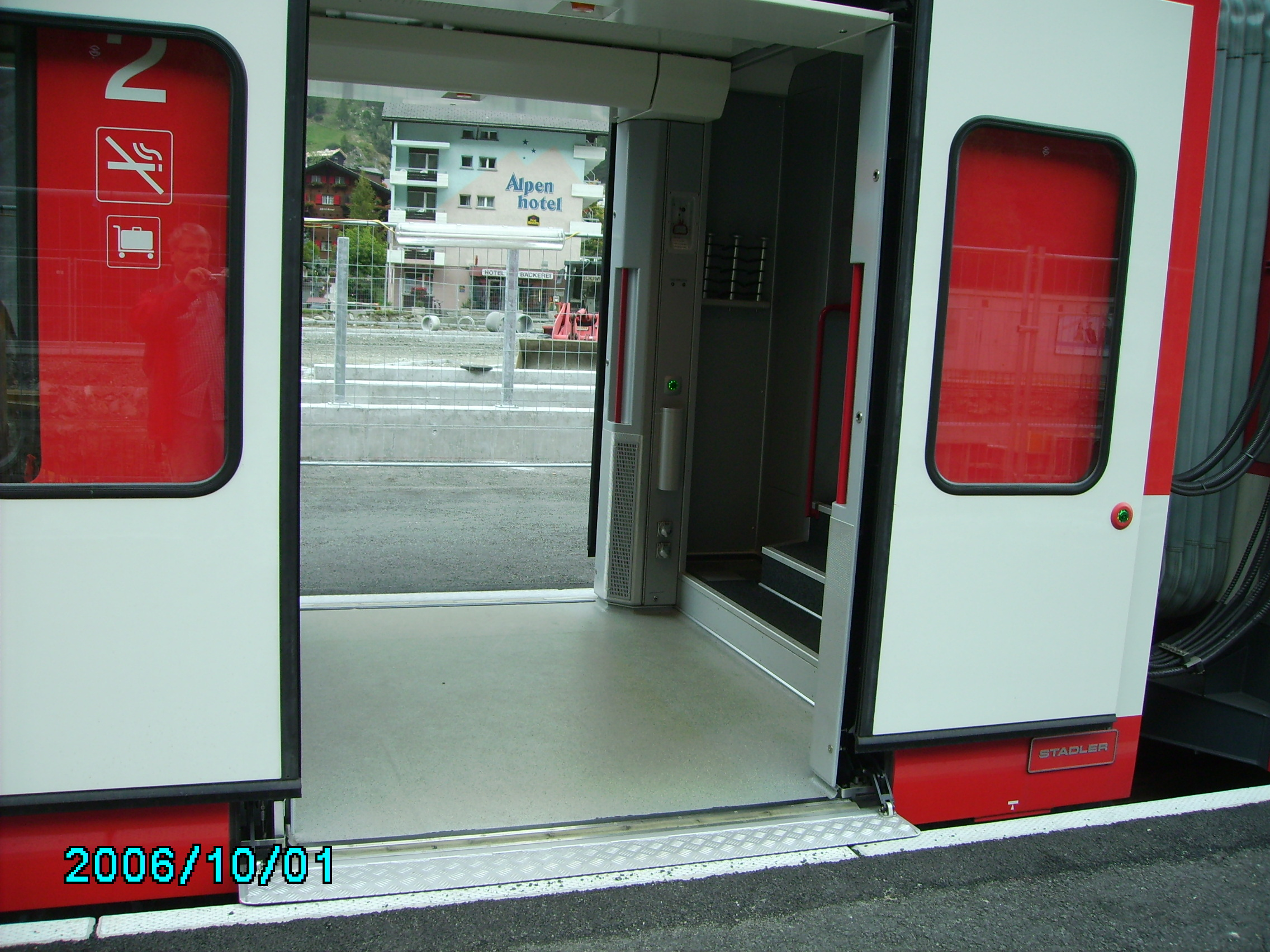 Höhengleicher Übergang beim BDSeh 4/8 der Matterhorn-Gotthard-Bahn in der Schweiz